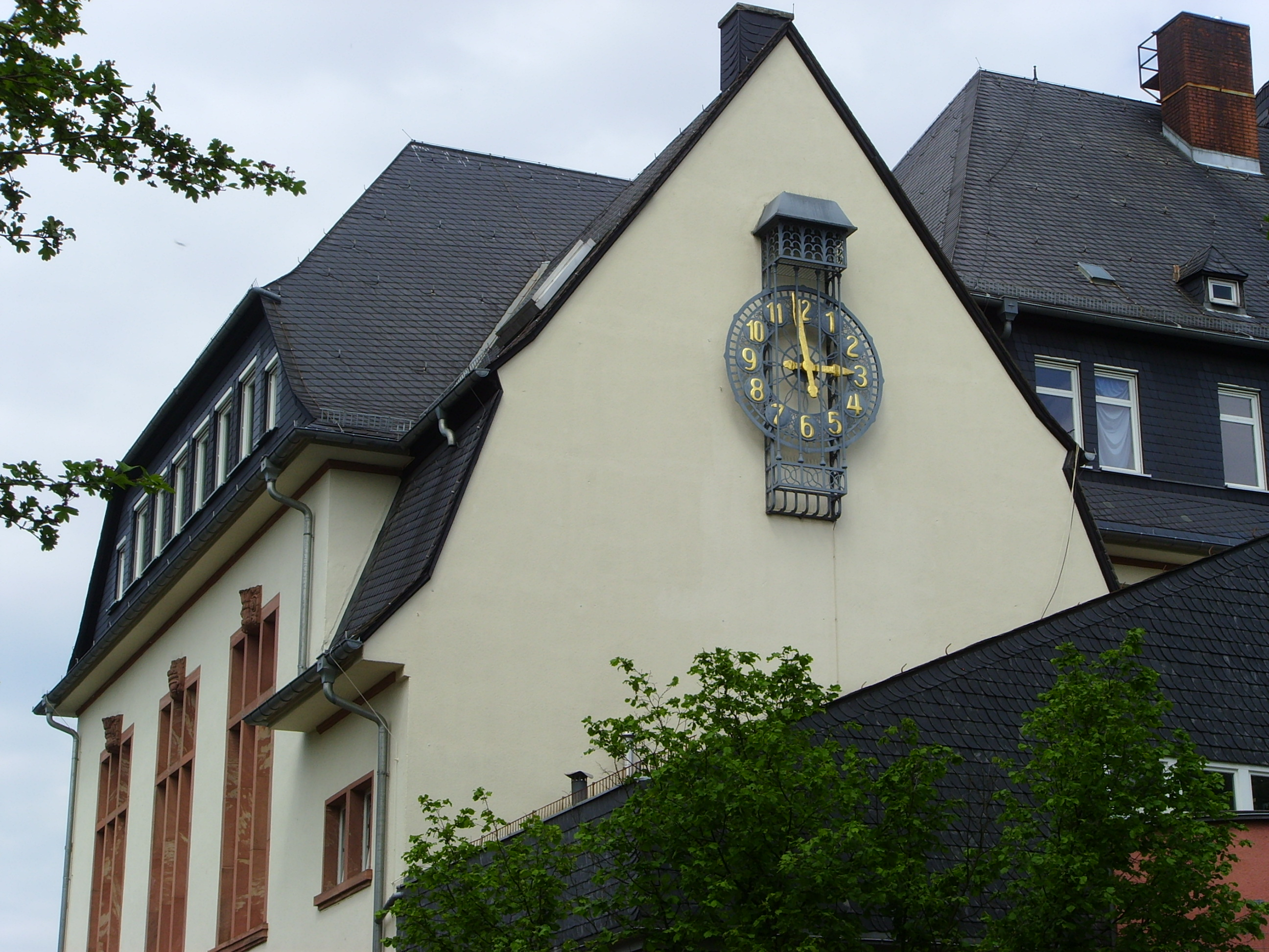 Ziehenschule in Frankfurt am Main